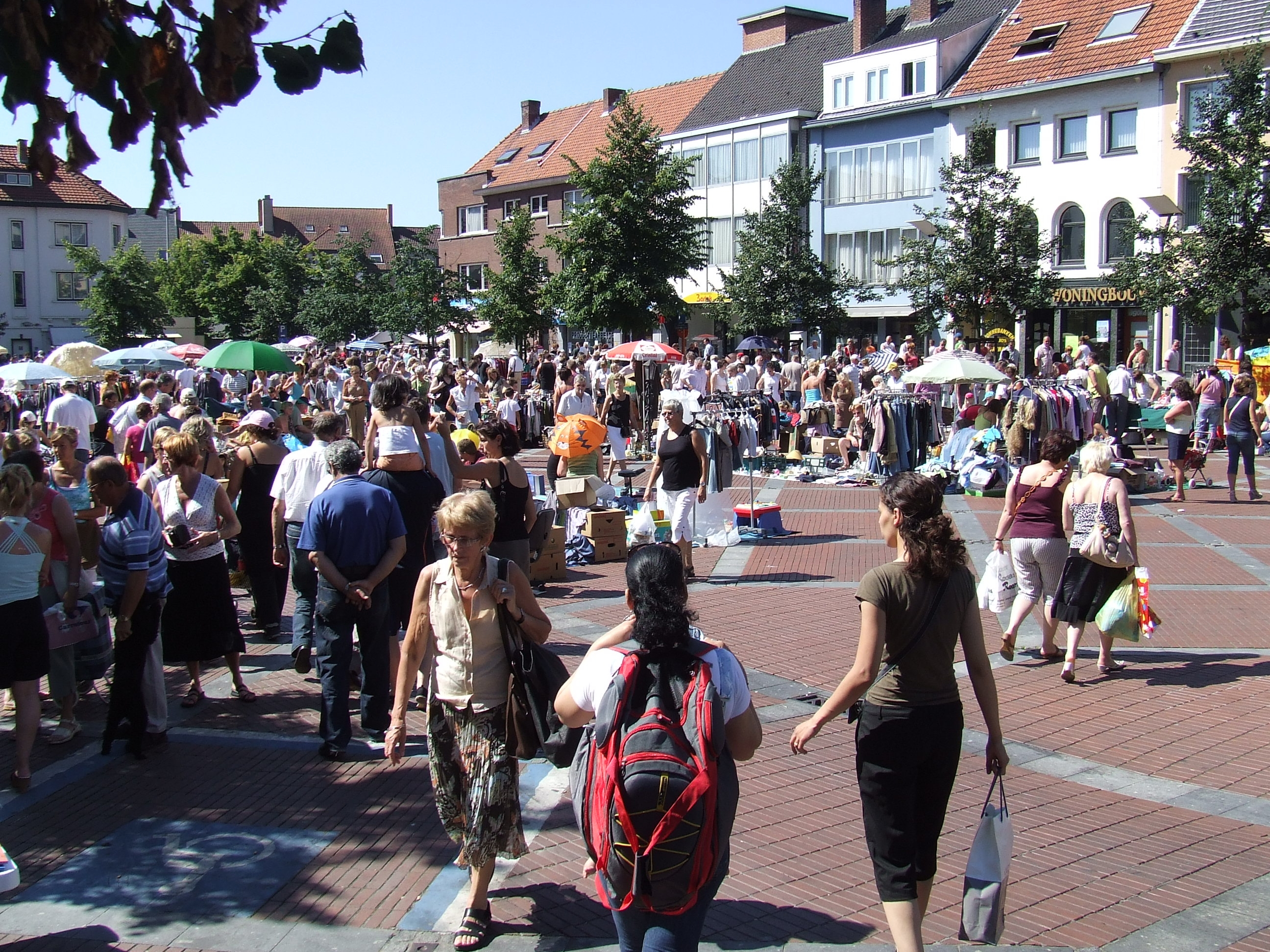 Foto zondagsmarkt Genk